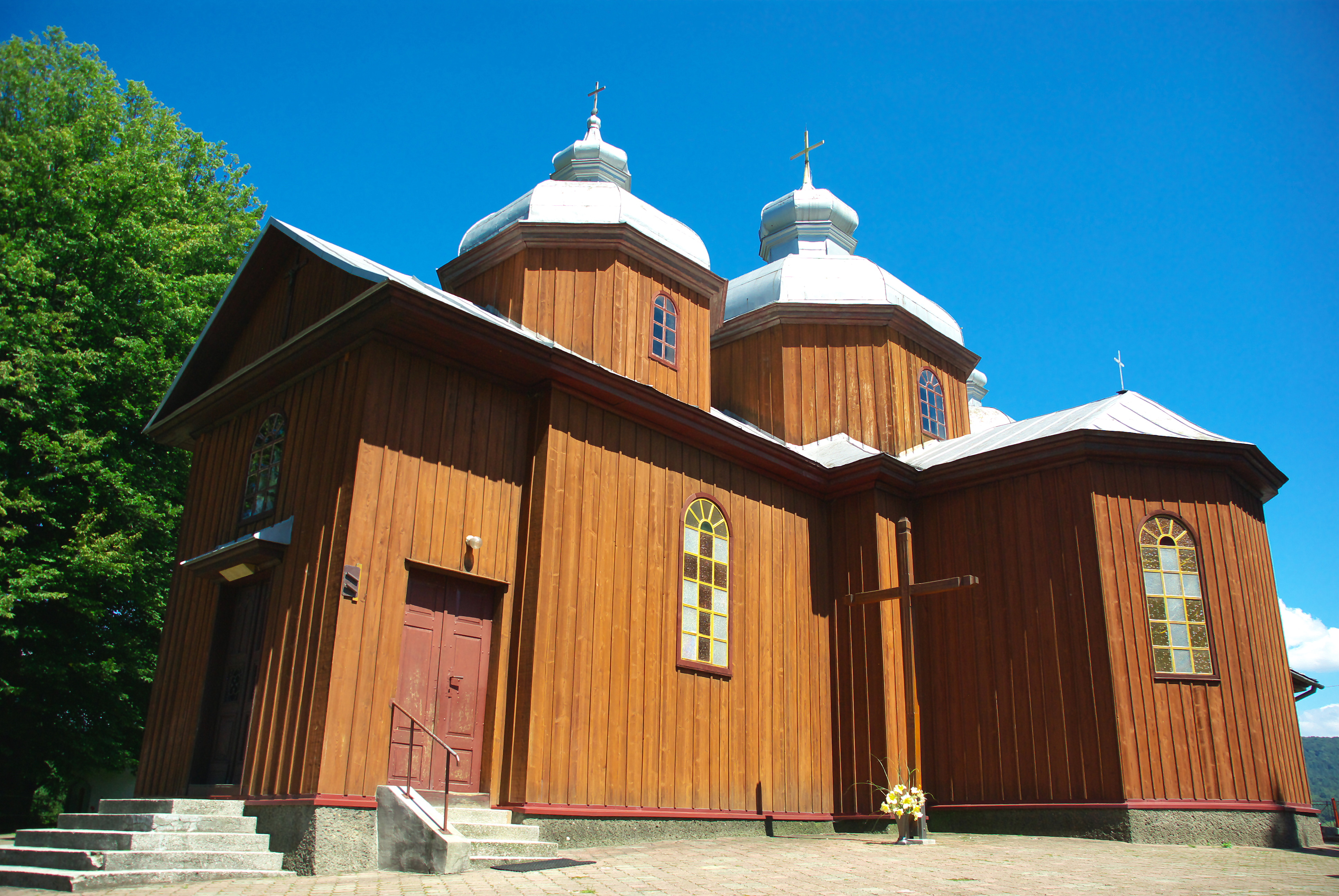 Cerkiew św. Jerzego w Jurowcach (A-354/96 z 13.05.1996)